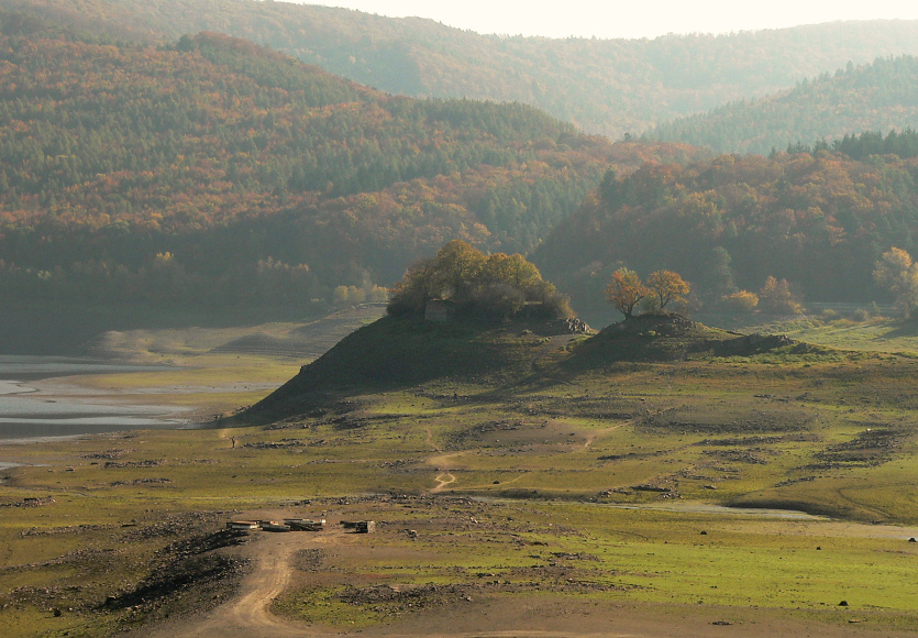 Liebesinsel im Edersee bei extremem Niedrigwasser